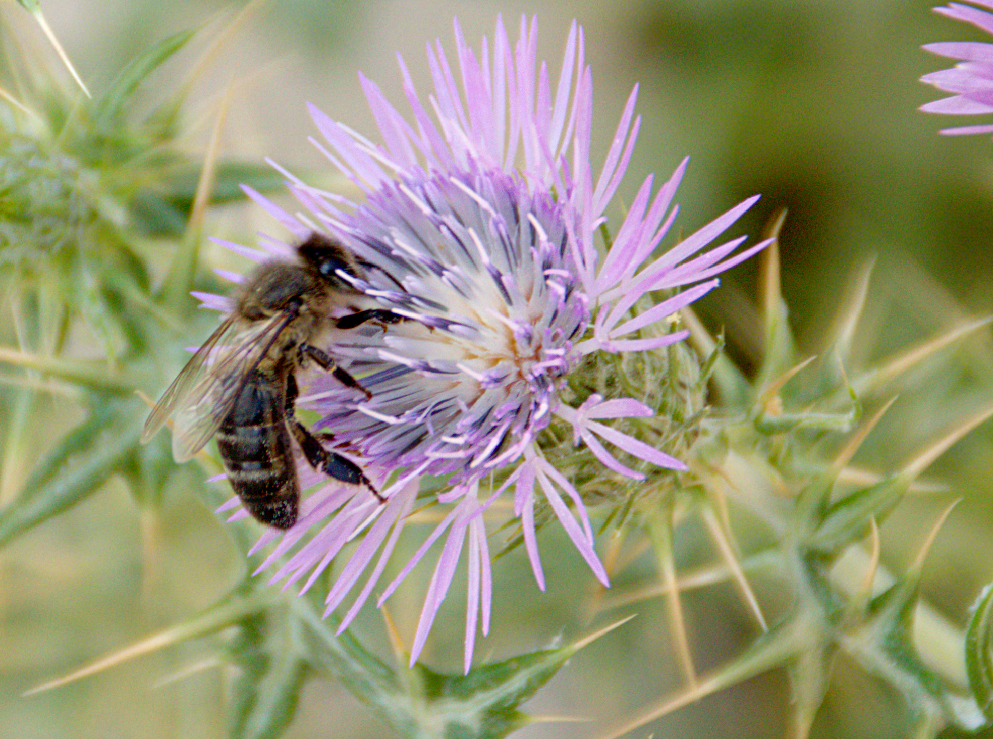 Abeille maghrébine (Tellienne) photographiée en Tunisie